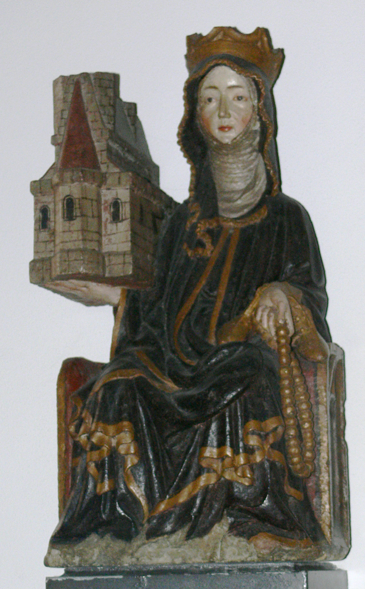 Passau, Kloster Niedernburg, Klosterkirche Heilige Hedwig von Andechs, Steinskultpur, Niederbayern um 1410/1420